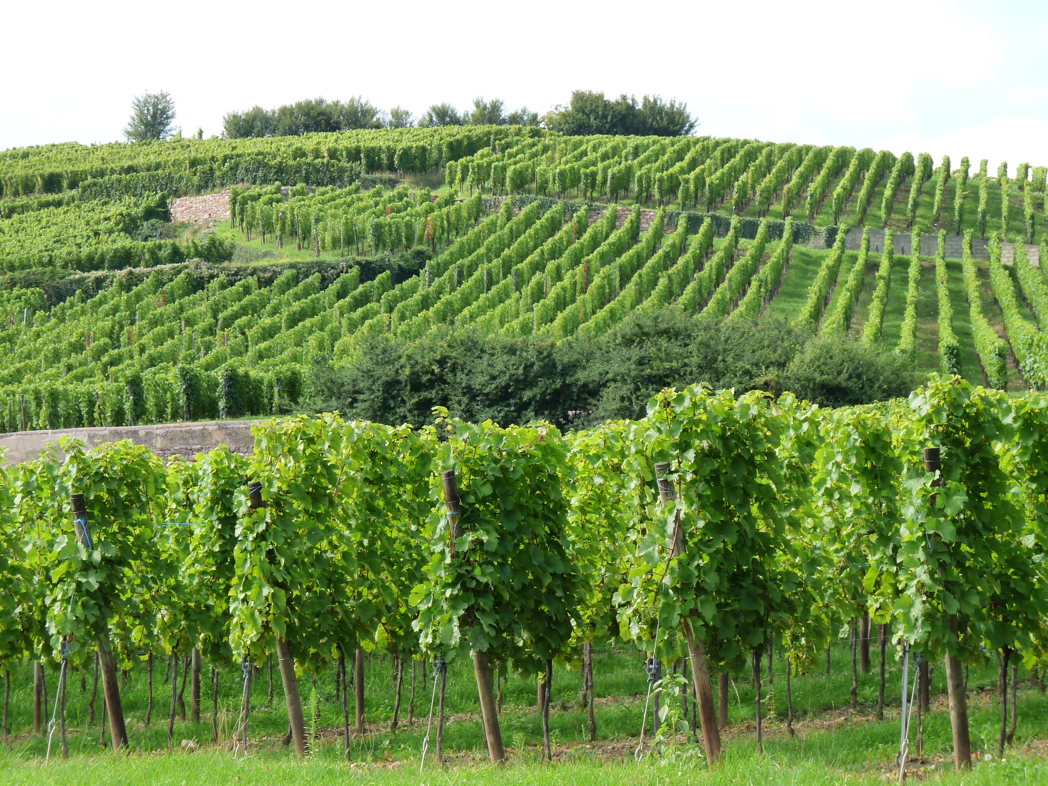 Vignes dans Ribeauvillé (Haut-Rhin)